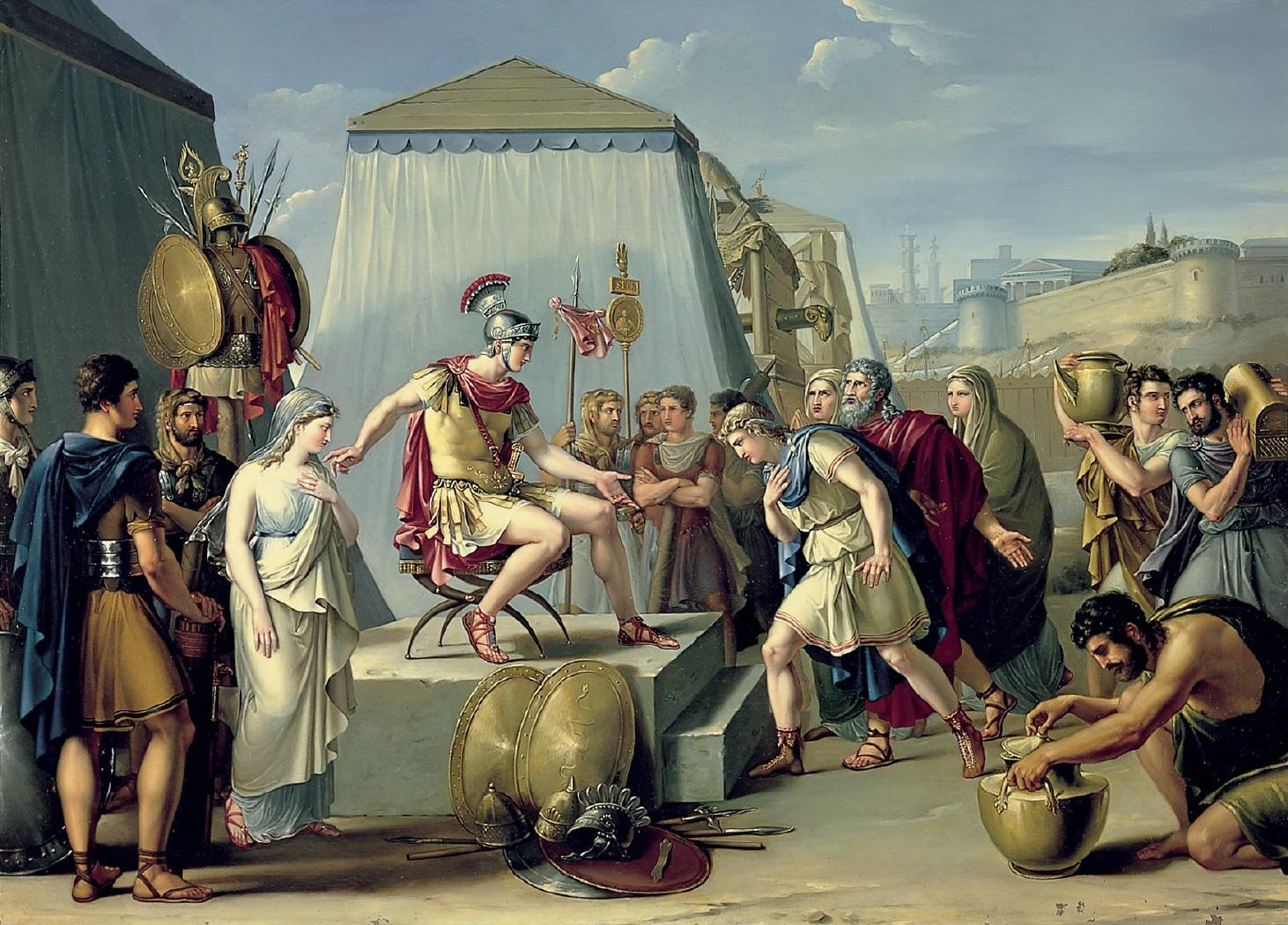 La obra representa a Escipión el Africano, que conquistó en nombre de Roma gran parte de la Península Ibérica. Escipión tiene en su poder a una hermosa joven, prometida de un caudillo celtíbero, pero rechaza el rescate ofrecido y devuelve la muchacha a los suyos.